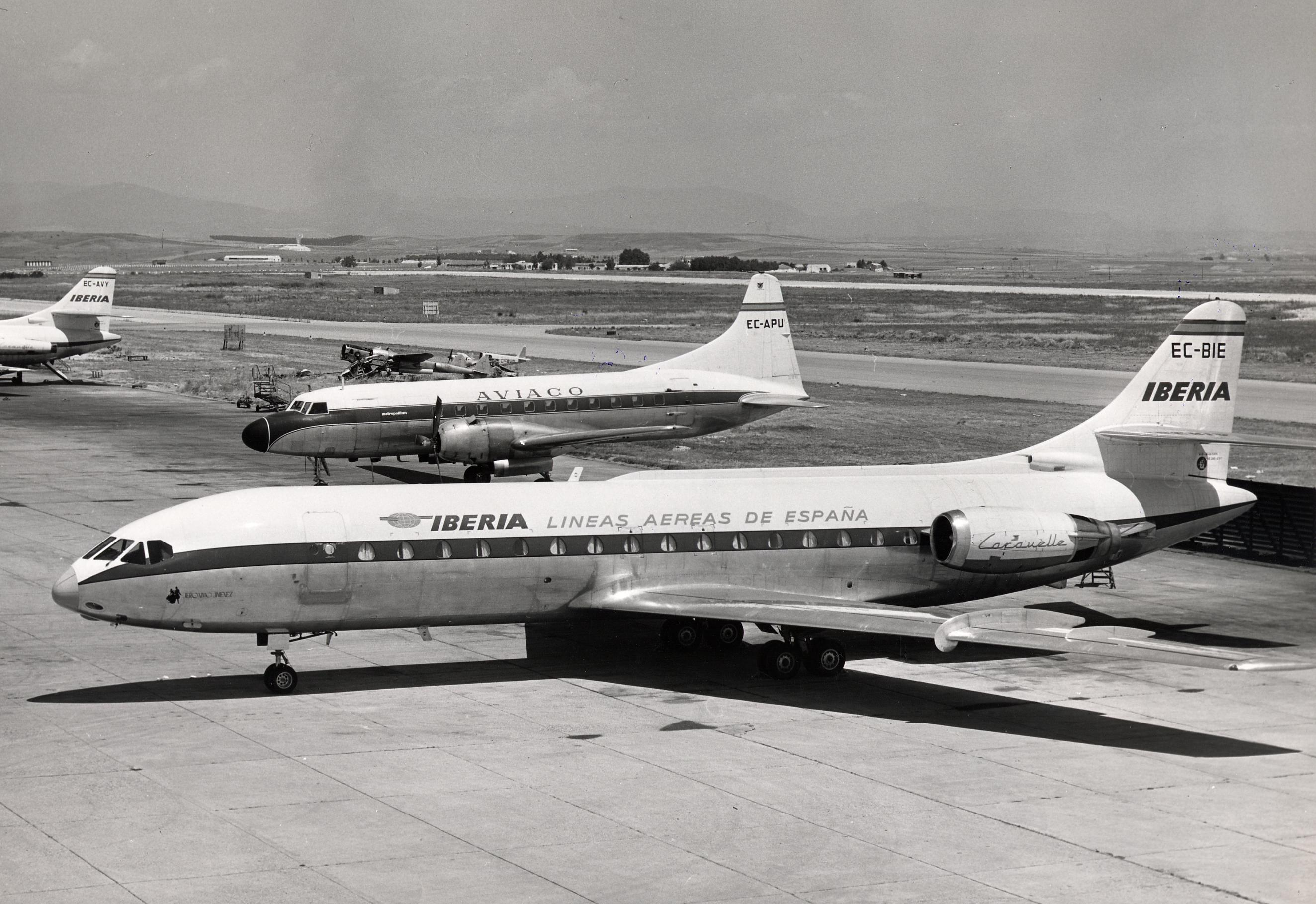 EC-BIE